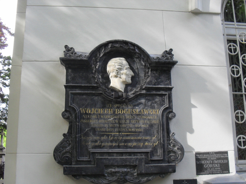 Warszawa, Cmentarz Powązkowski